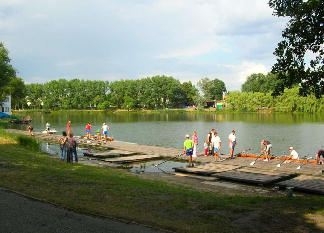 Tor regatowy nad jeziorem Gopło w Kruszwicy